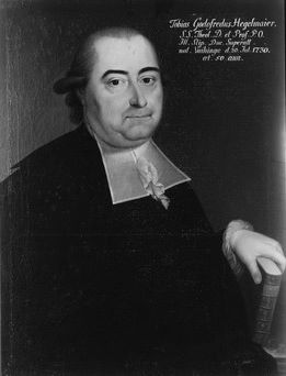 Bild in der Tübinger Professorengalerie